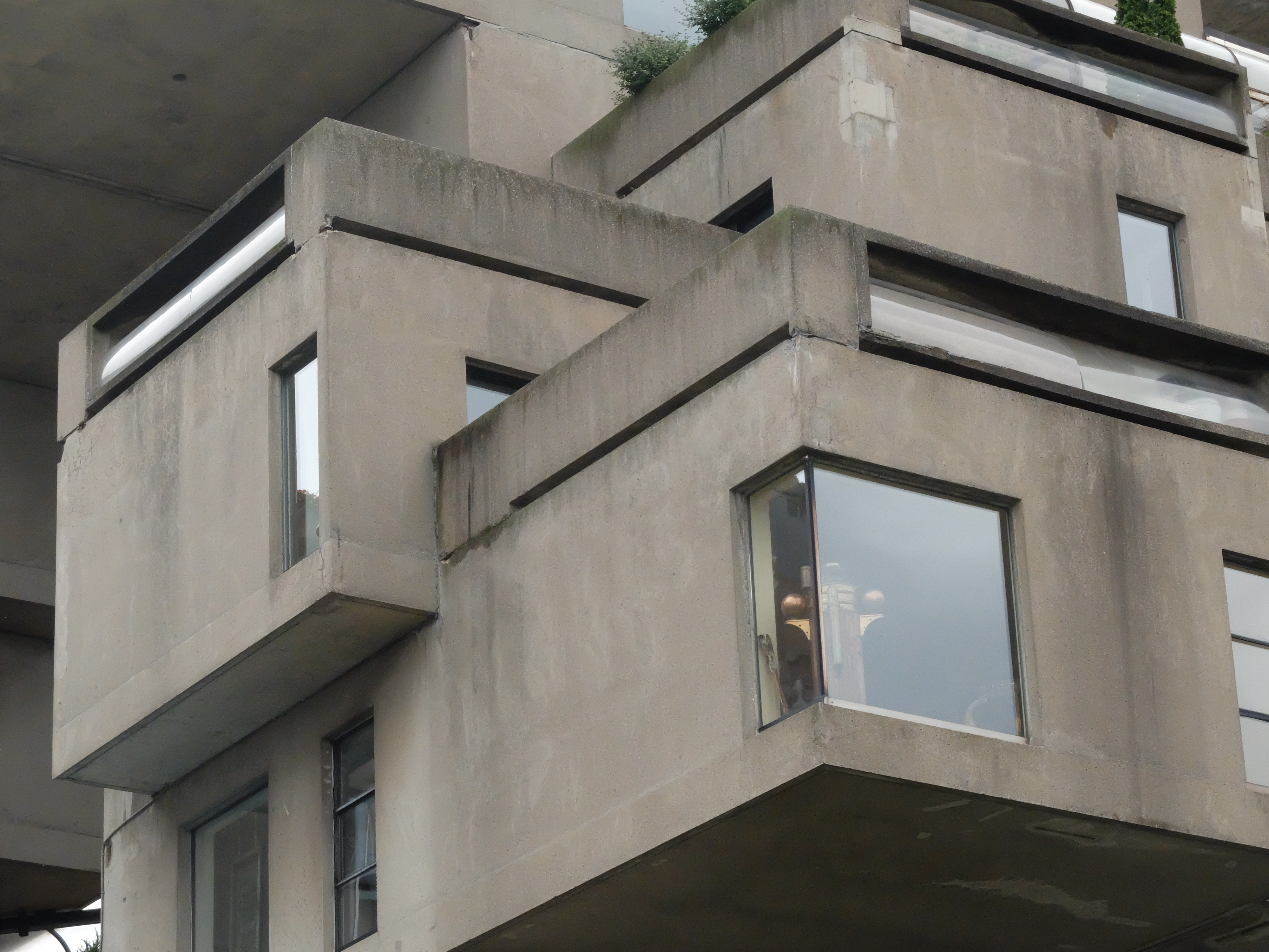 Habitat 67, Montréal.